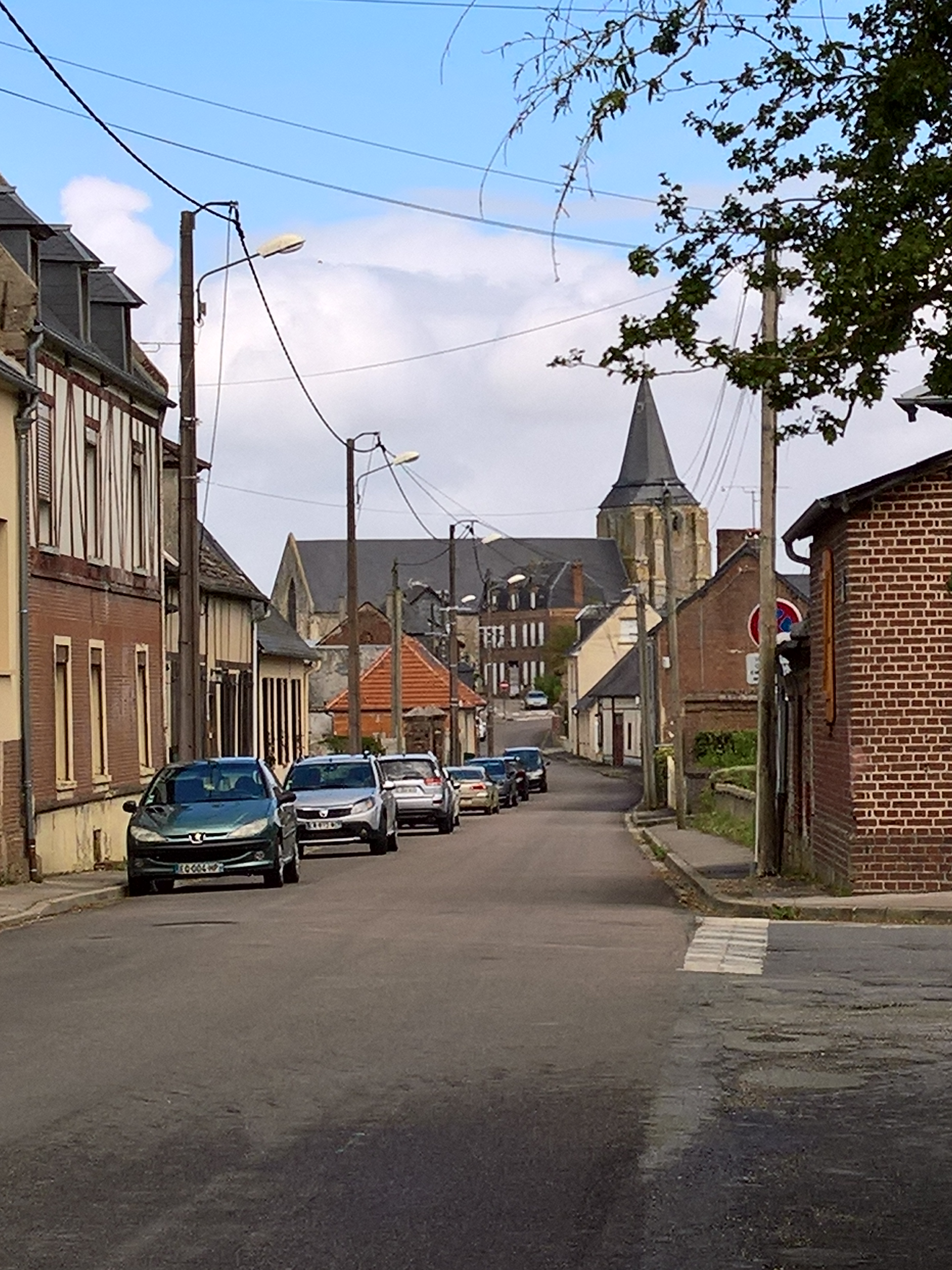 Feuquières : Rue Marie BaurieuxPaysage urbain. Au fond, l'église Notre-Dame